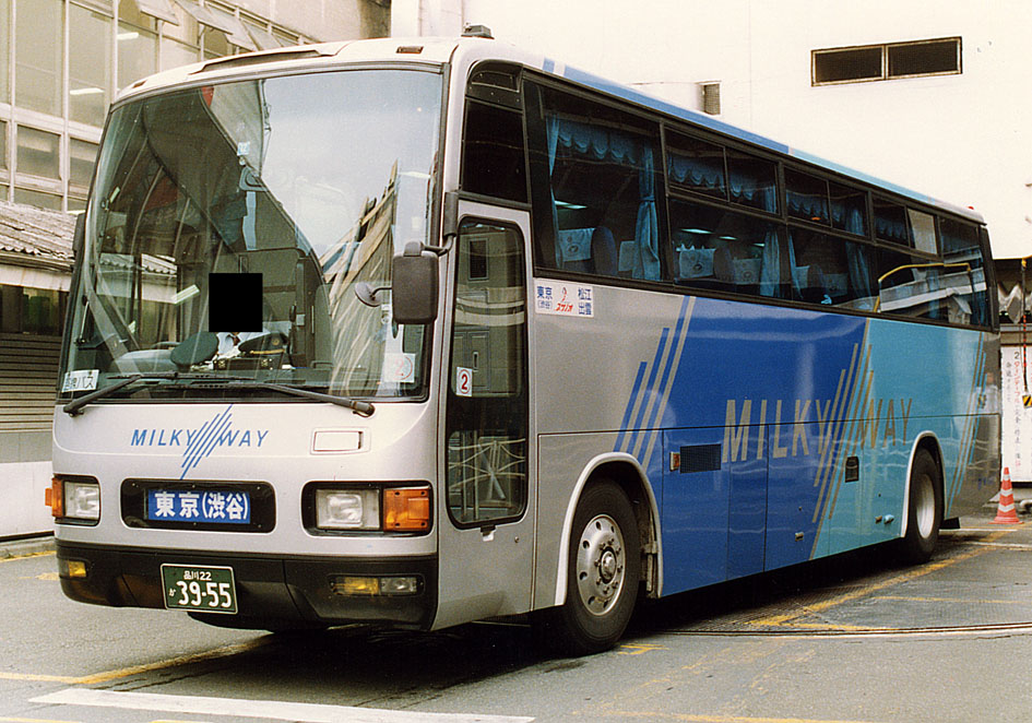 東急バス ミルキーウェイ スサノオ